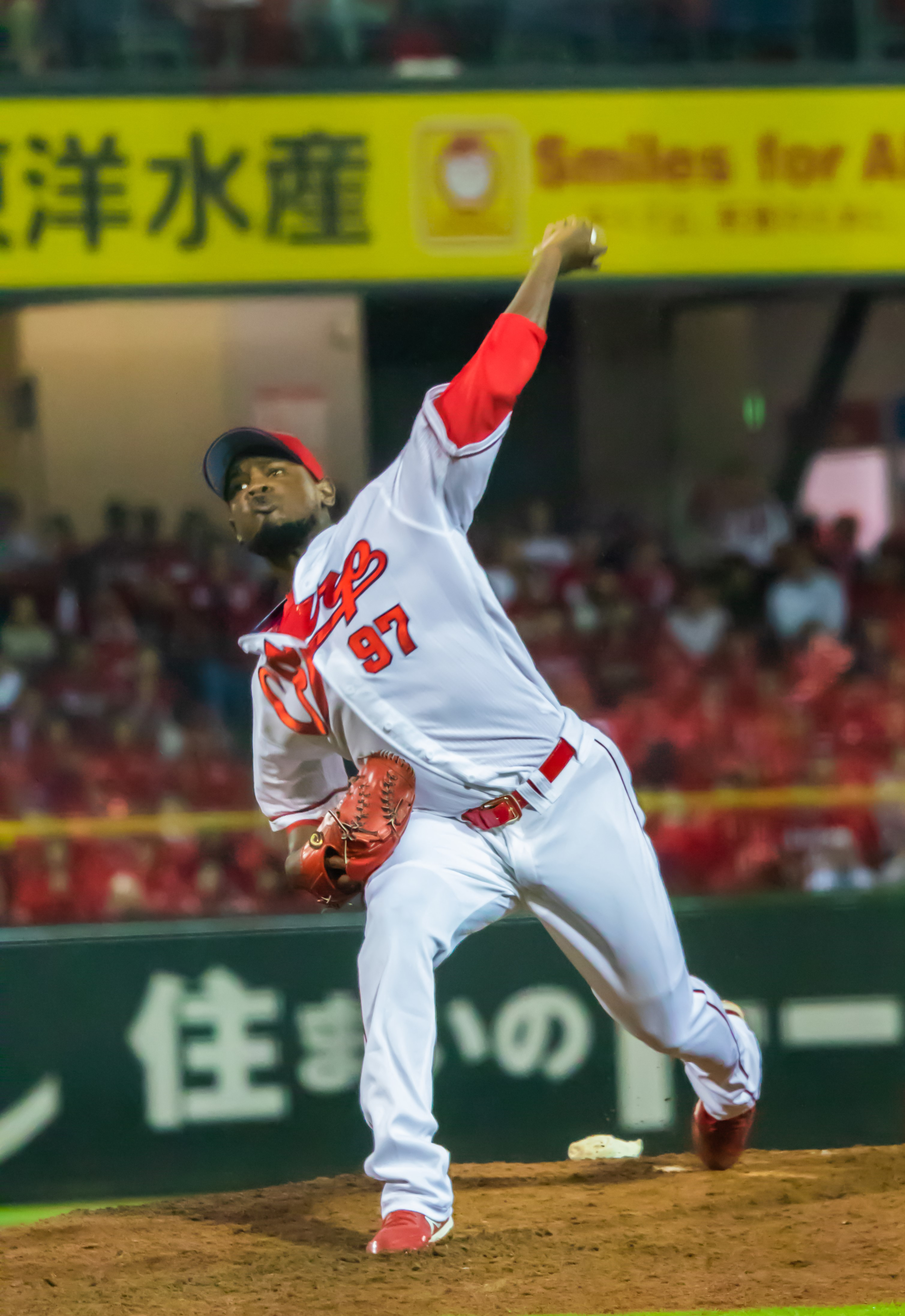 2018年9月12日 マツダスタジアム